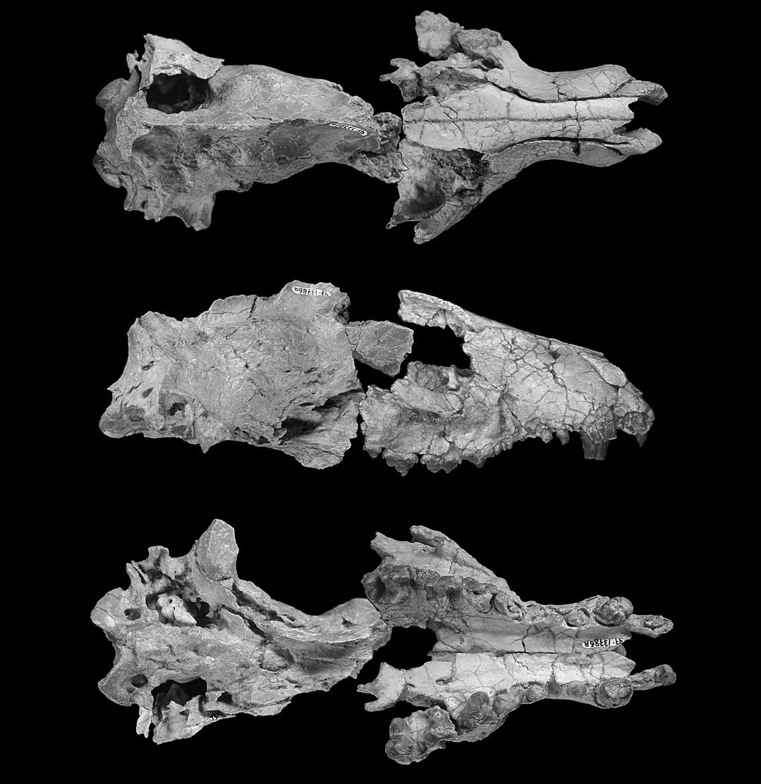 Skull of Dissacus zanabazari